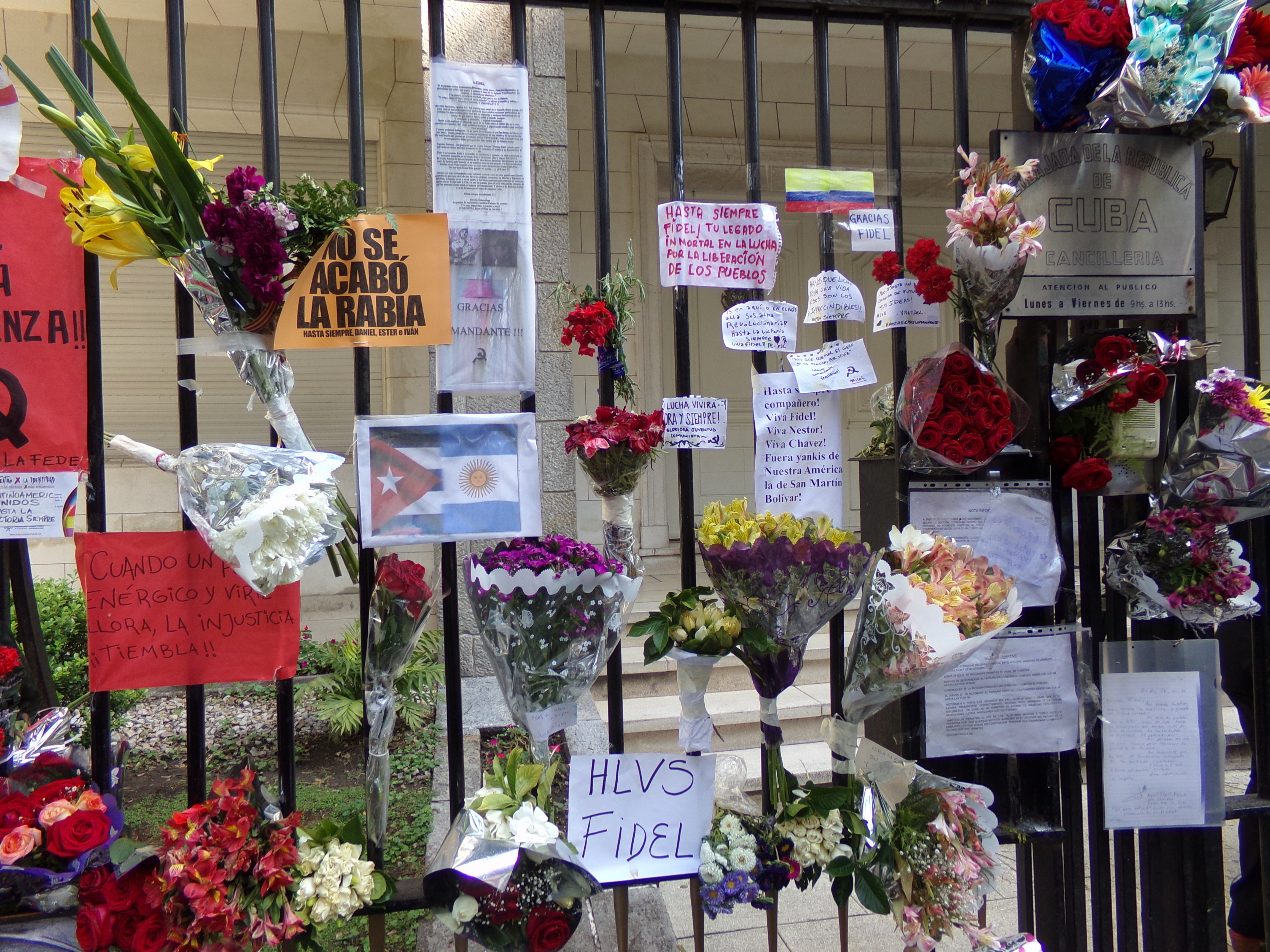 Homenajes a Fidel Castro en la Embajada de Cuba en Buenos Aires, Argentina, tras su fallecimiento.